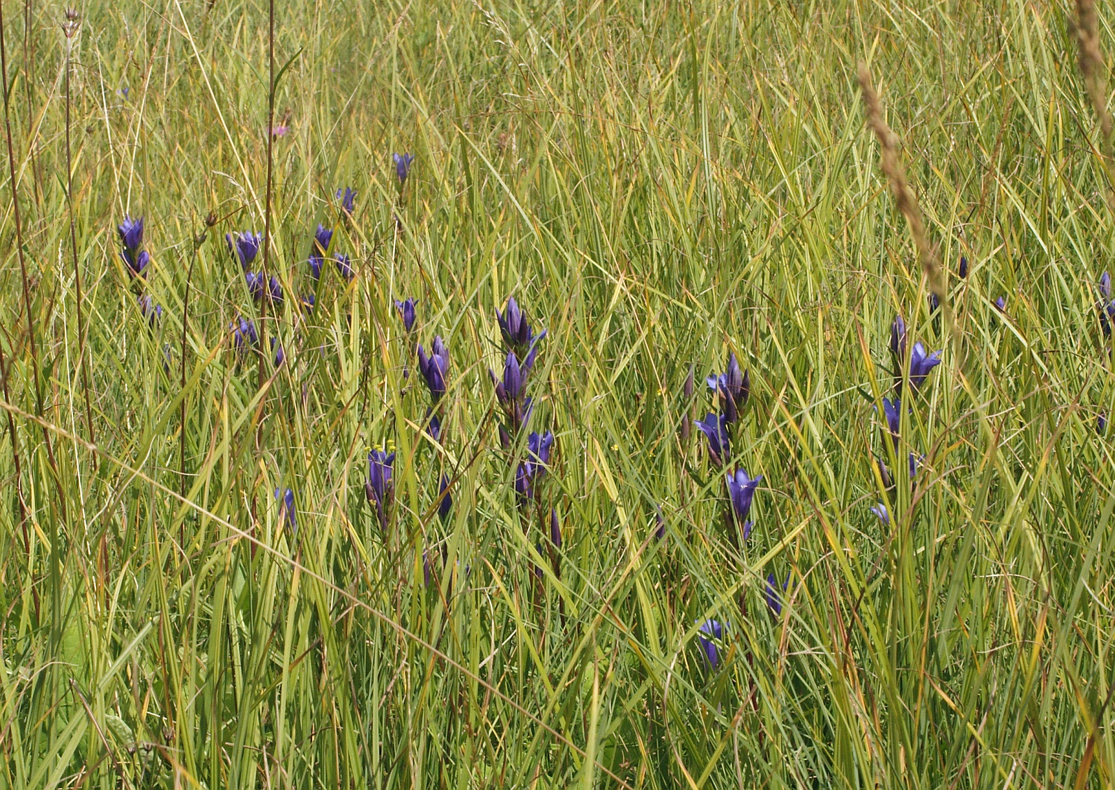 Gentiana pneumonanthe, Schwäbische Alb, Germany